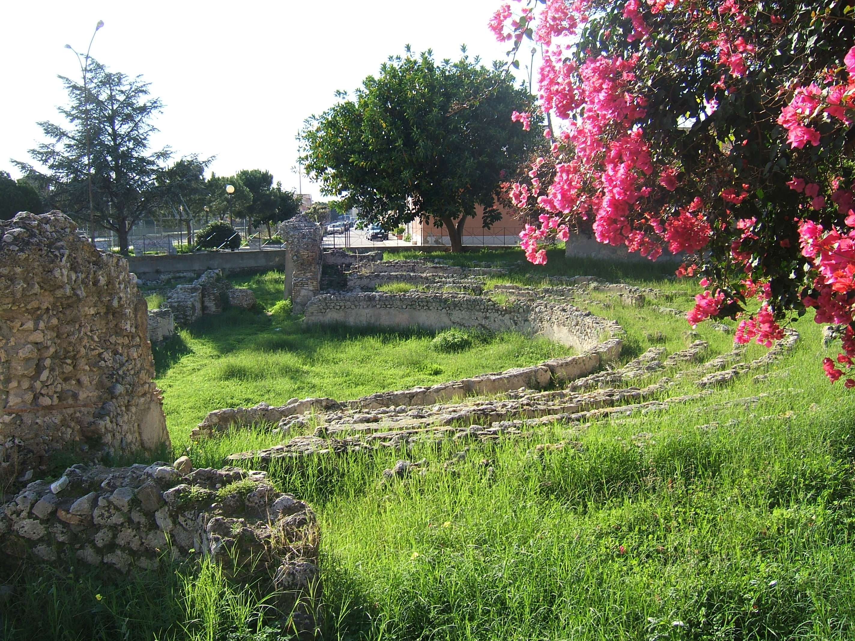 Resti Terme Romane a Marina di Gioiosa Ionica (RC)